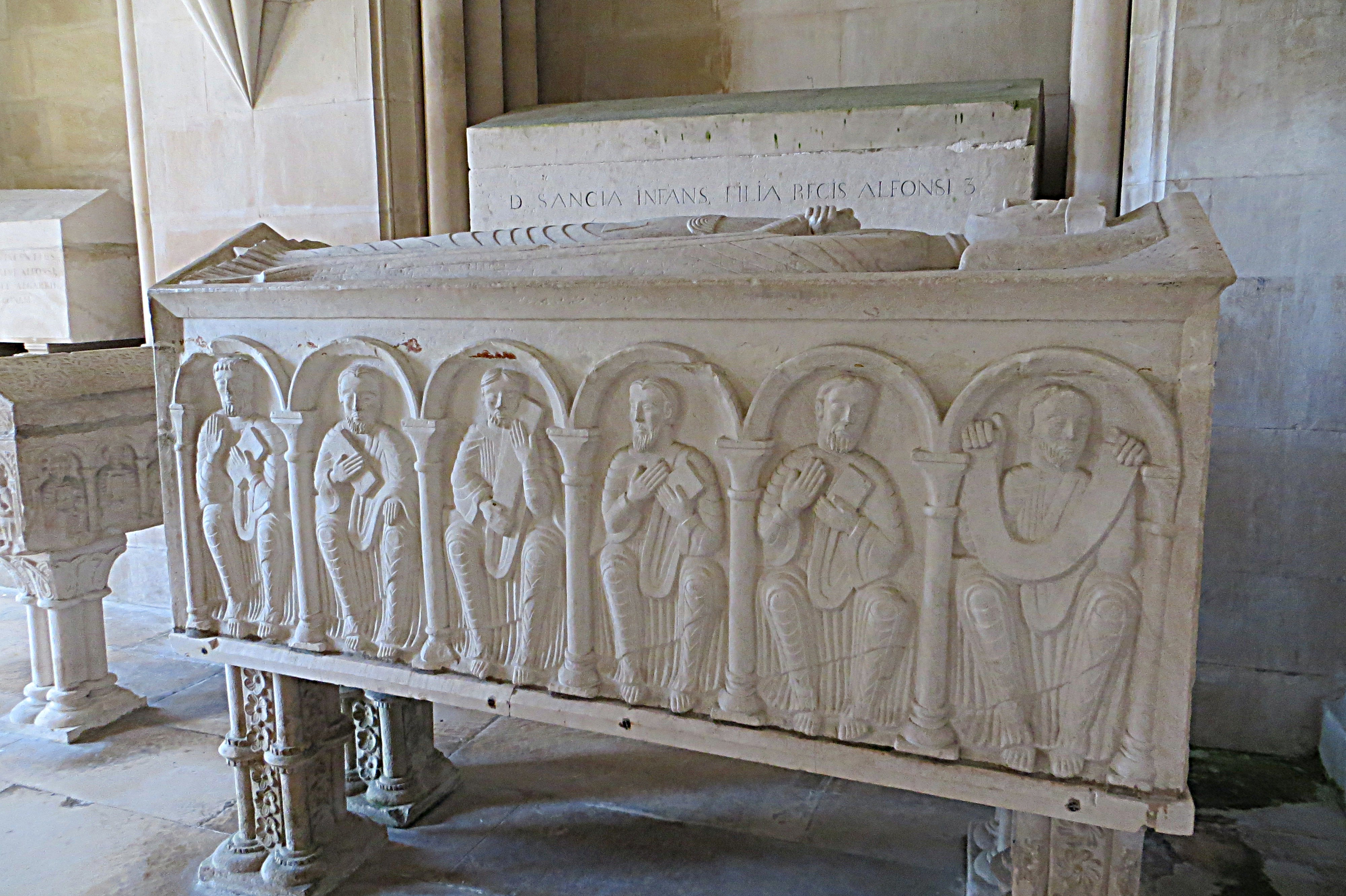 Mosteiro de Santa Maria de Alcobaça